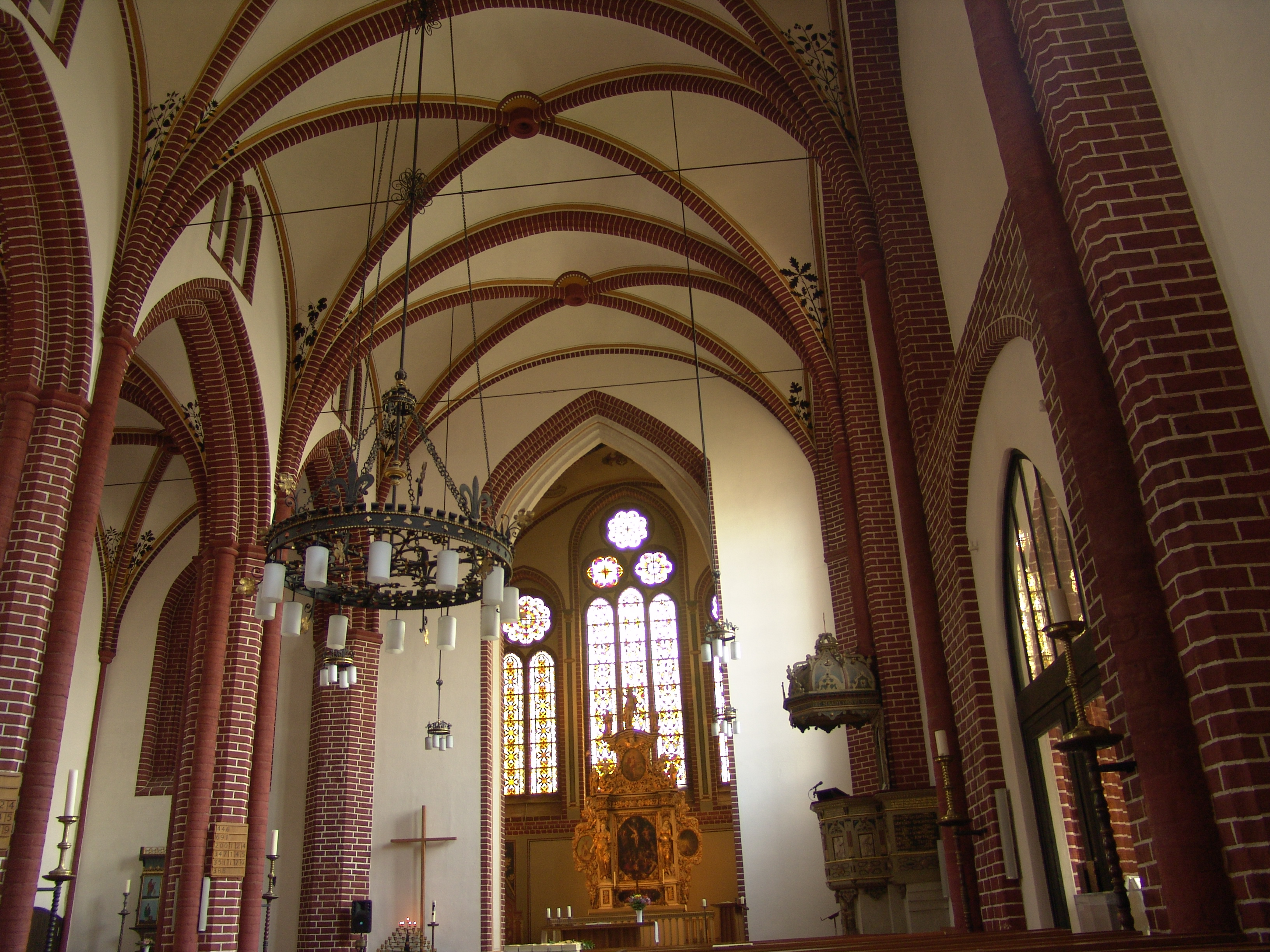 St. Johanneskirche in Neubrandenburg